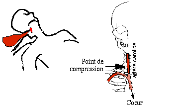 Point de compression carotidien (à la base du cou) : avec le pouce, comprimer l'artère carotide contre la colonne vertébrale